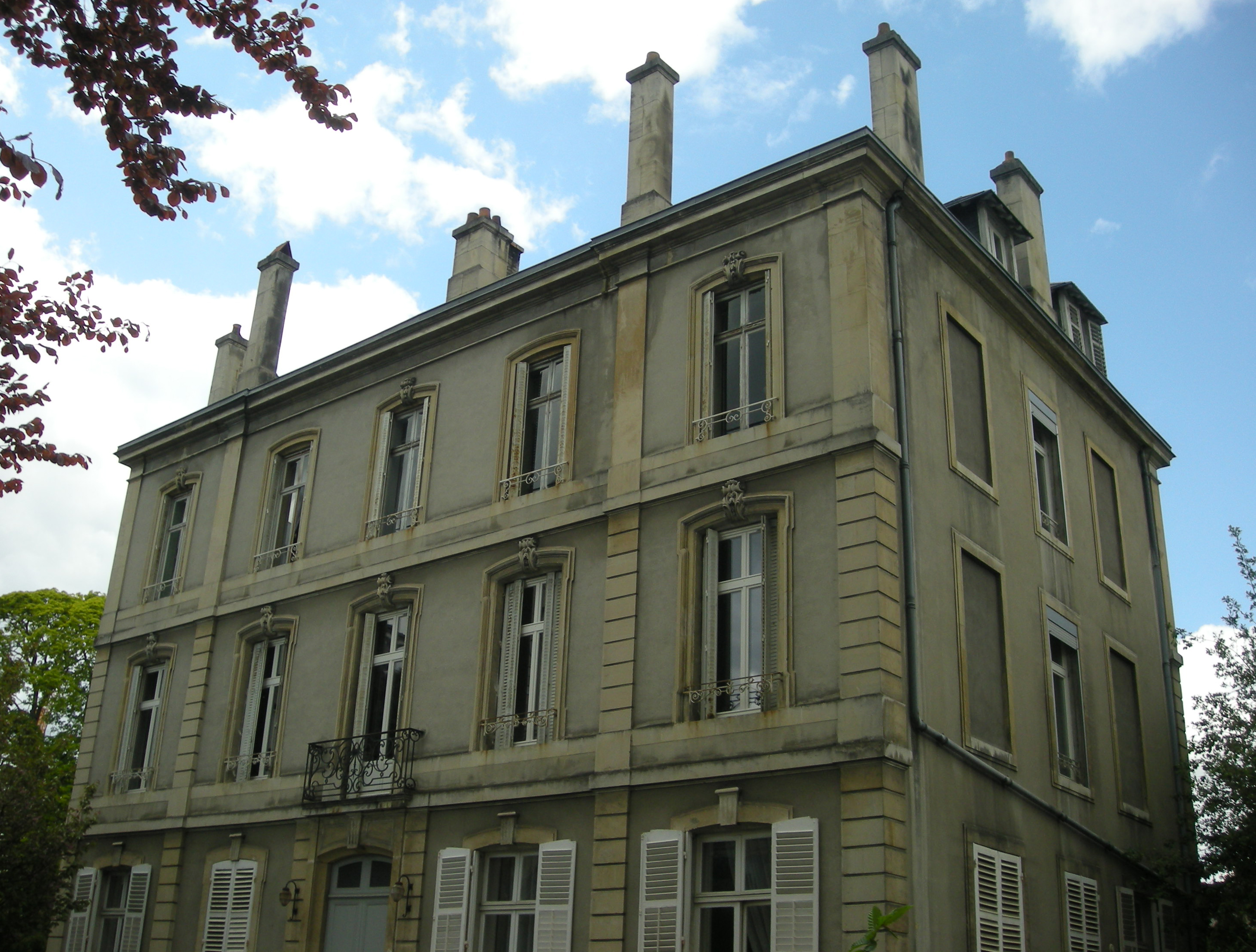 La maison construite par Charles Gallé (père d'Emile Gallé) au n° 2, avenue de la Garenne, à Nancy